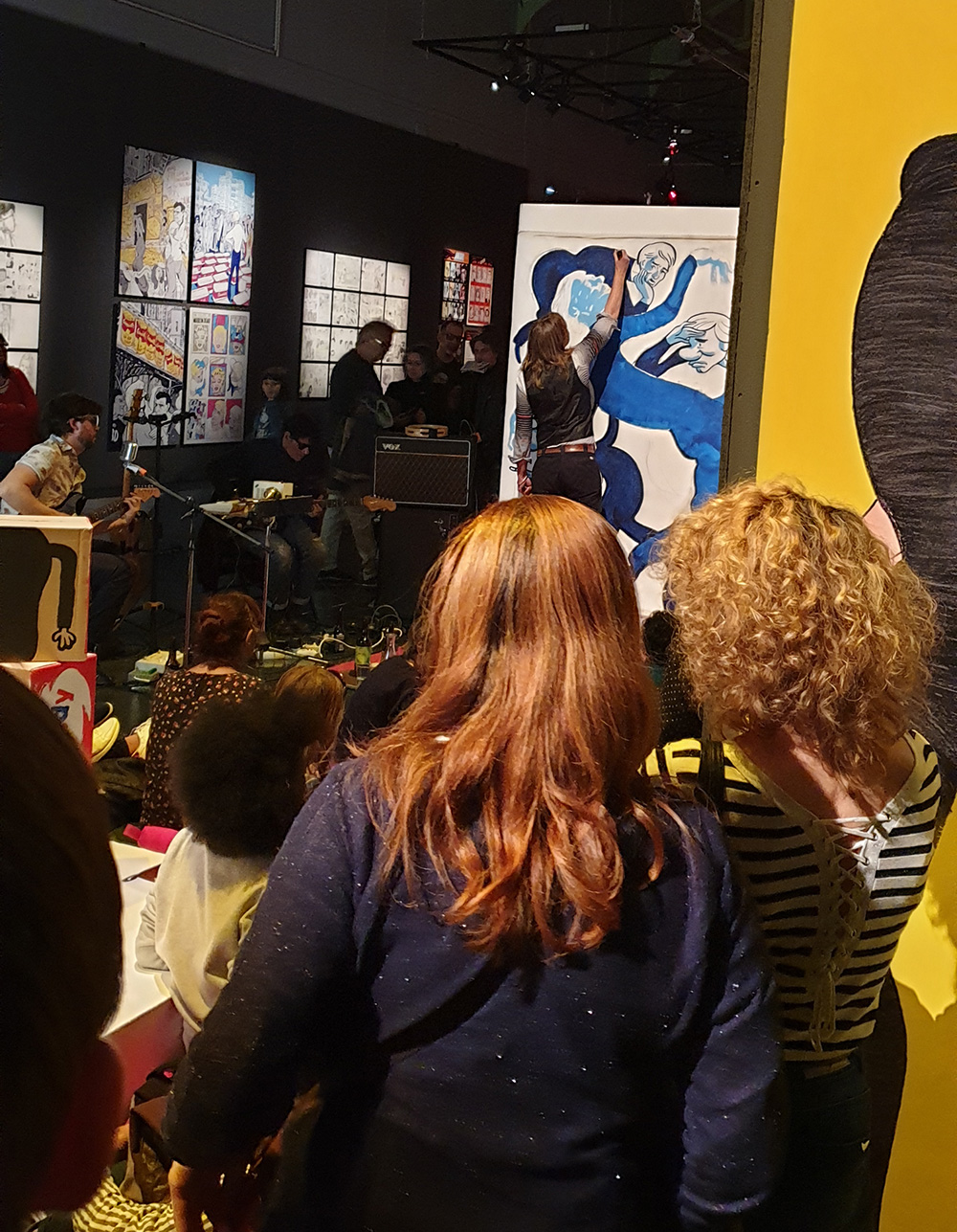 Soirée WARHOL SHOW - édition 2019